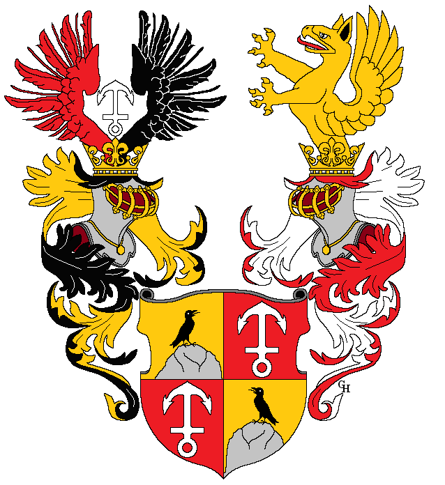 Wappen des österreichischen Wirtschaftsfachmanns und Beamten Franz Anton Raab (1722–1783), verliehen anlässlich seiner Erhebung in den österreichischen Ritterstand 1755. Zeichnung von Gerd Hruška ( Für weitere Informationen zu dieser Standeserhebung siehe (